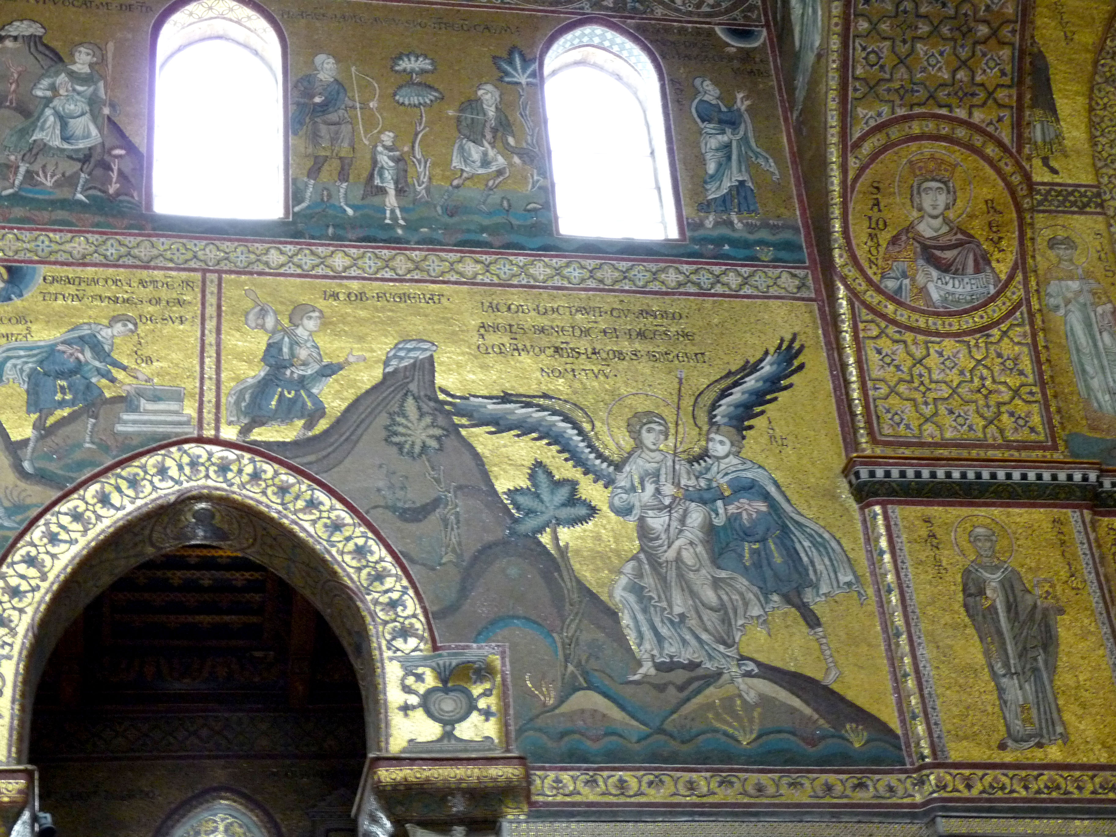 Duomo di Monreale - mosaici sulla navata sinistra: immagine del vecchio testamento; il re Salomone e sotto di esso la figura di San Marciano.